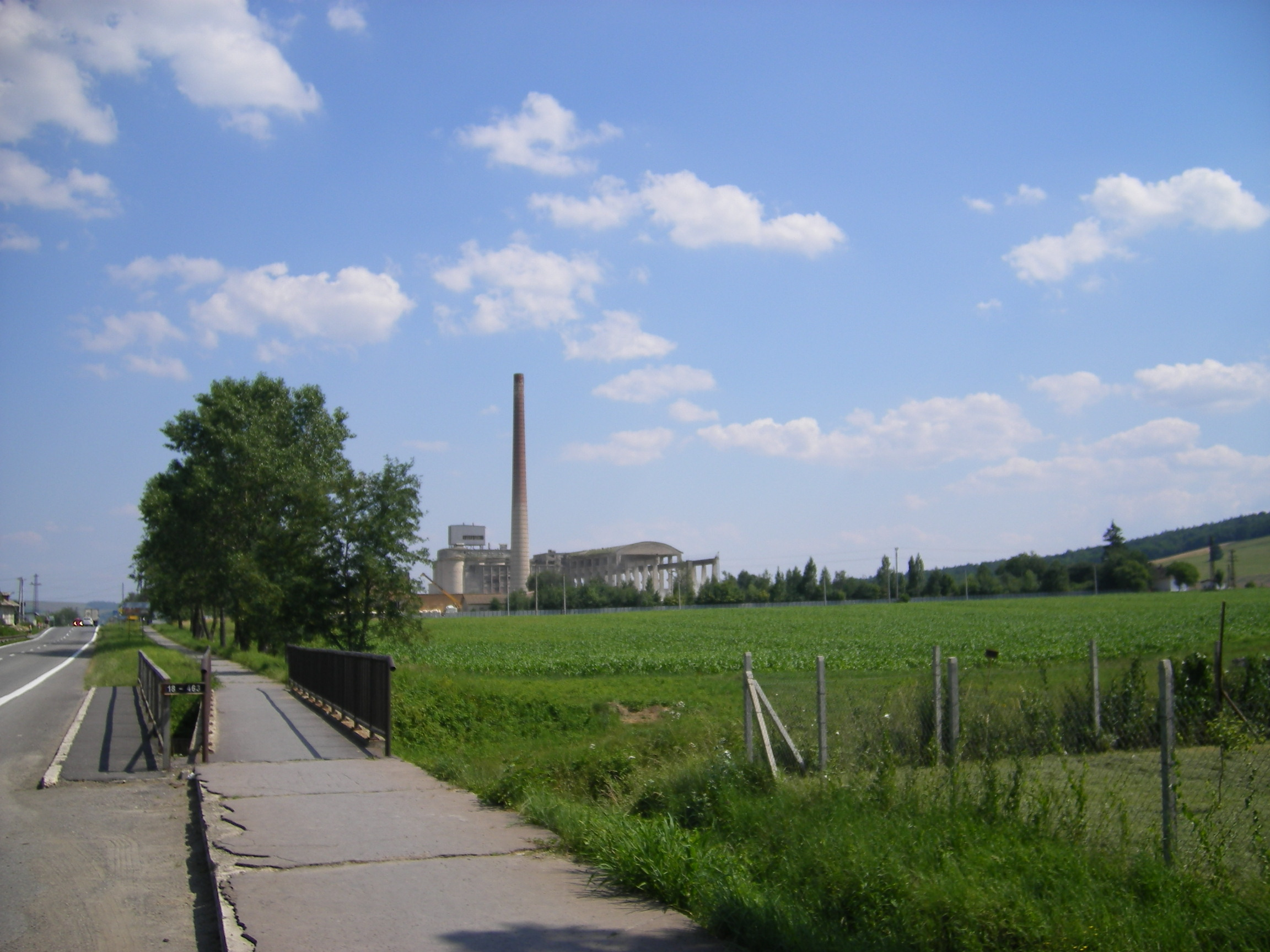 Bystré, okres Vranov nad Topľou